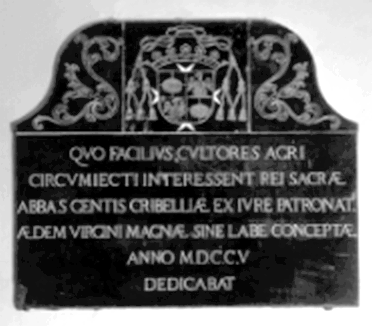 Lapide commemorativa della consacrazione della chiesa della Beata Vergine Immacolata in Casate Ticino, comune di Bernate Ticino, provincia di Milano, Italia.